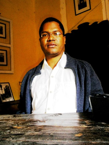 Forografía del escritor Carlos Wynter Melo